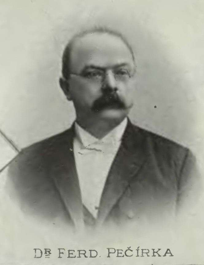 Portrét – Ferdinand Pečírka (1859-1922), Český lékař.